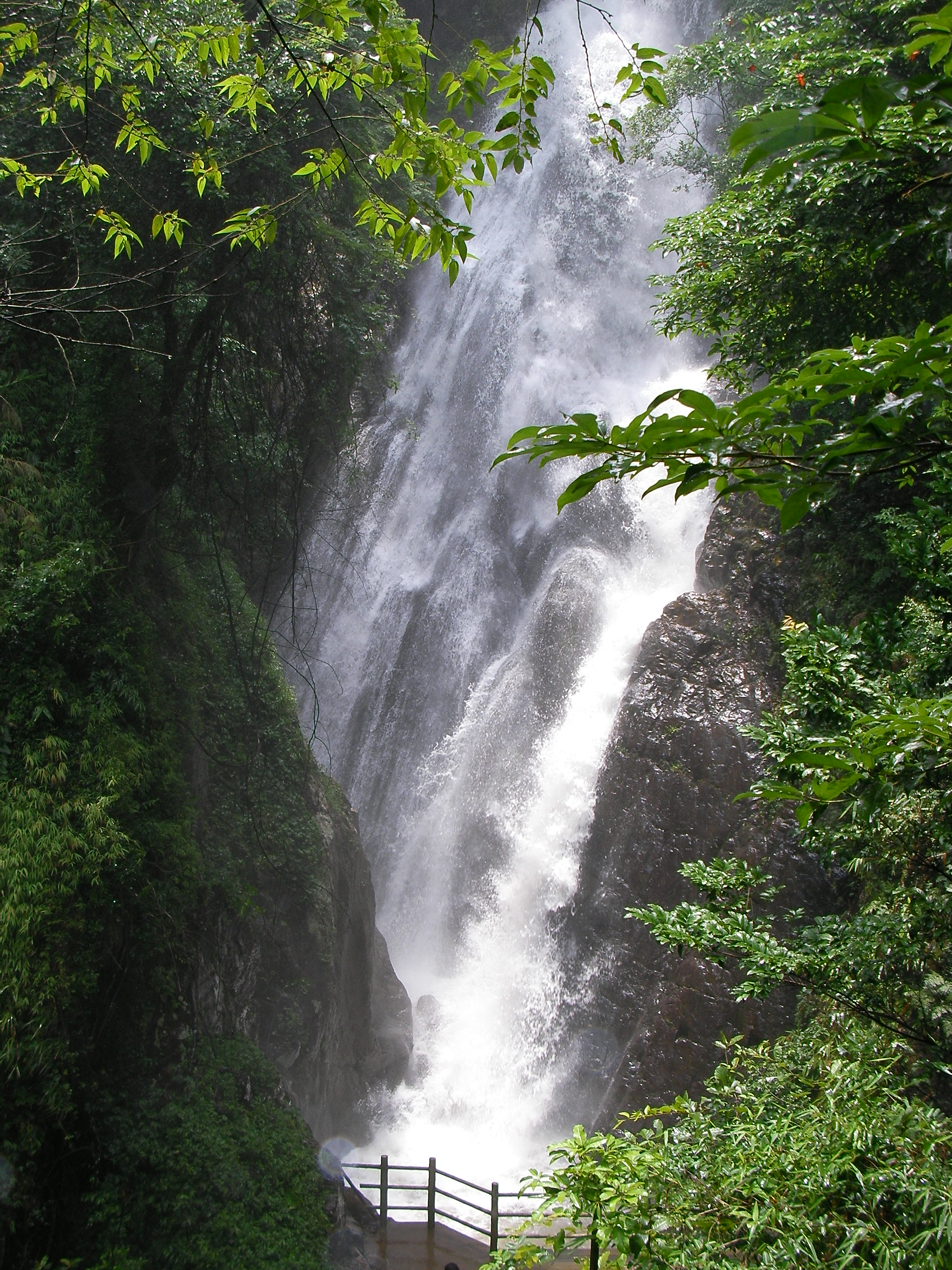 盤龍峽的瀑布